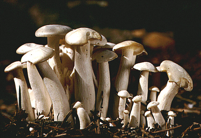 Weißer Rasling (Lyophyllum connatum) Fotograf: Walter J. Pilsak, Waldsassen Copyright Status: GNU Freie Dokumentationslizenz